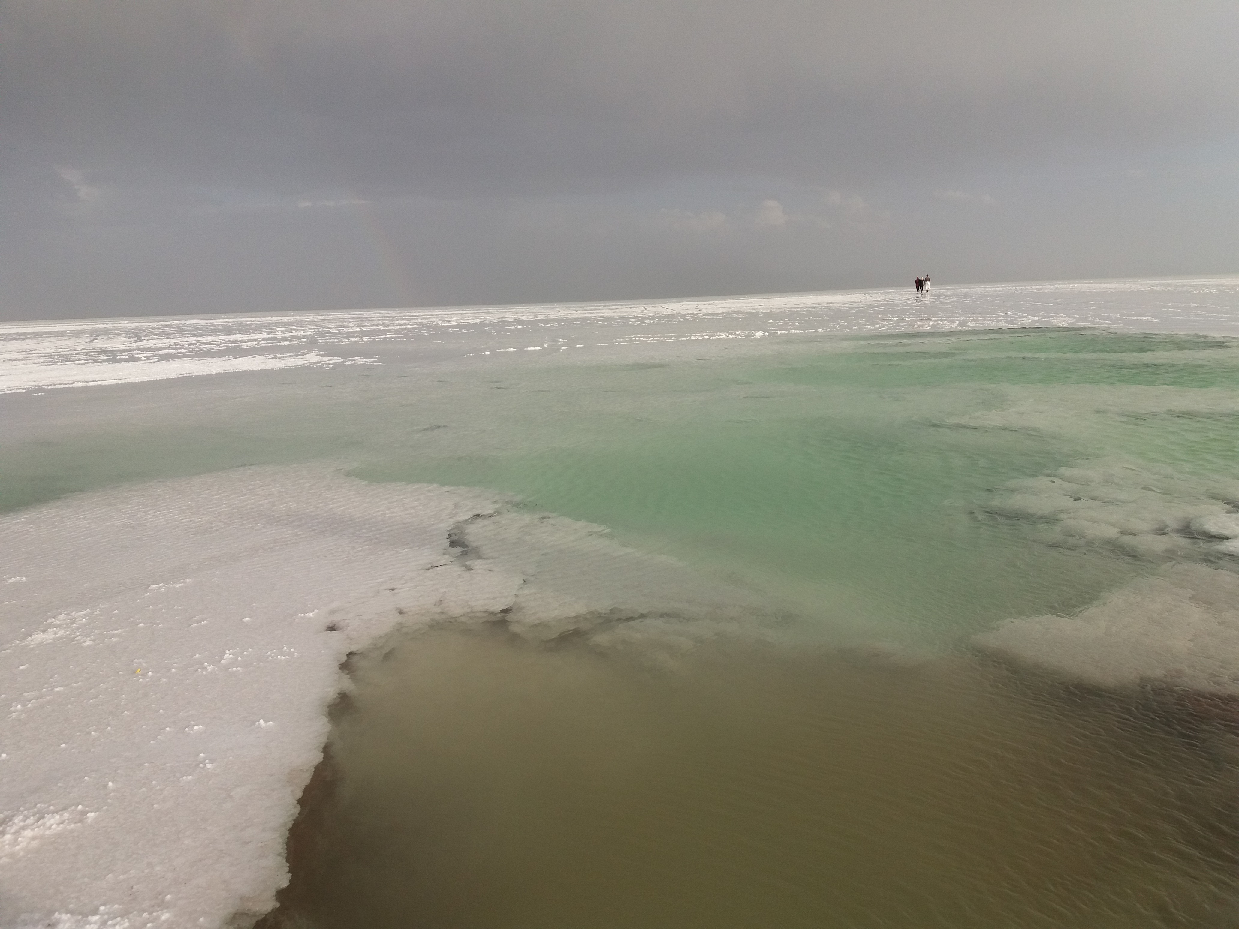 دریاچه کویر نمک بردسکن